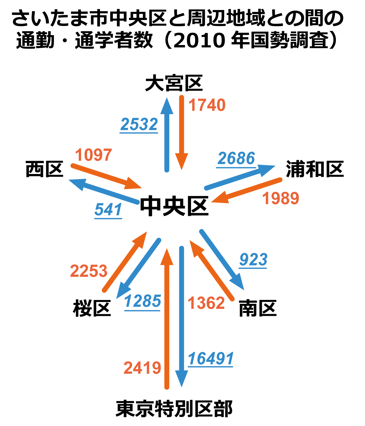 さいたま市中央区と周辺地域の通勤・通学流動。 2010年国勢調査より作成。